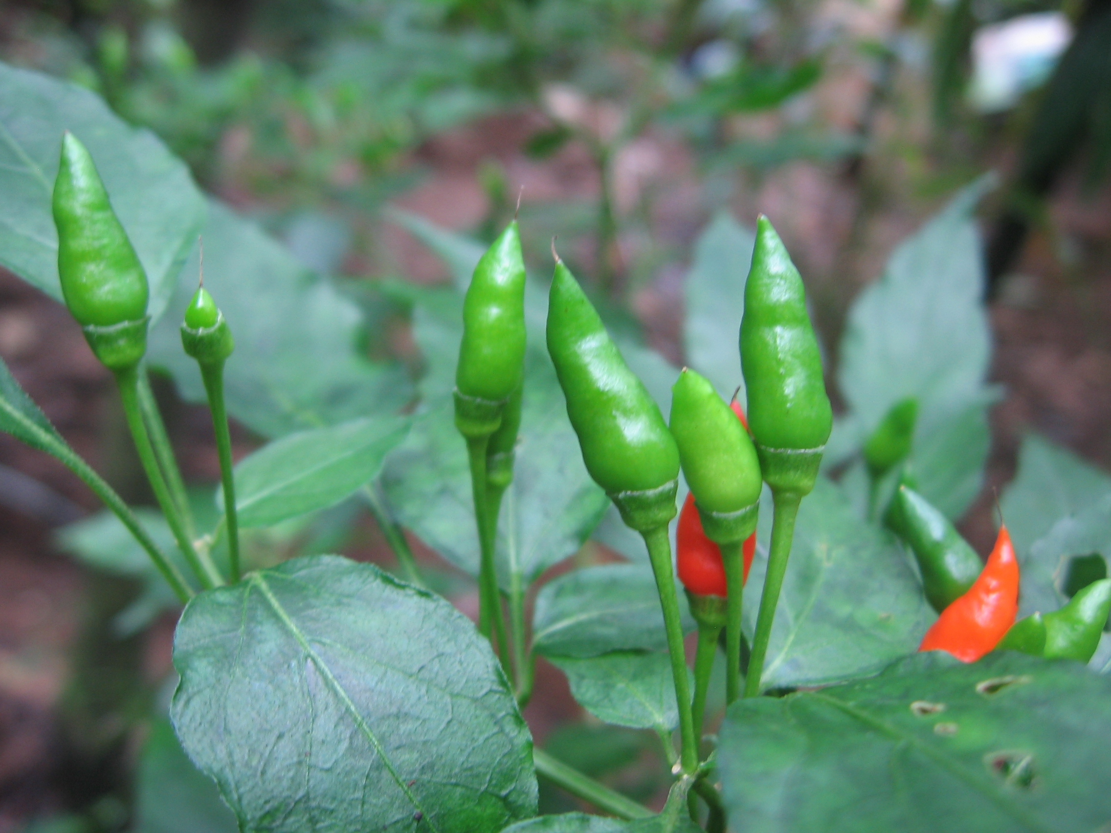 കാന്താരി മുളക്